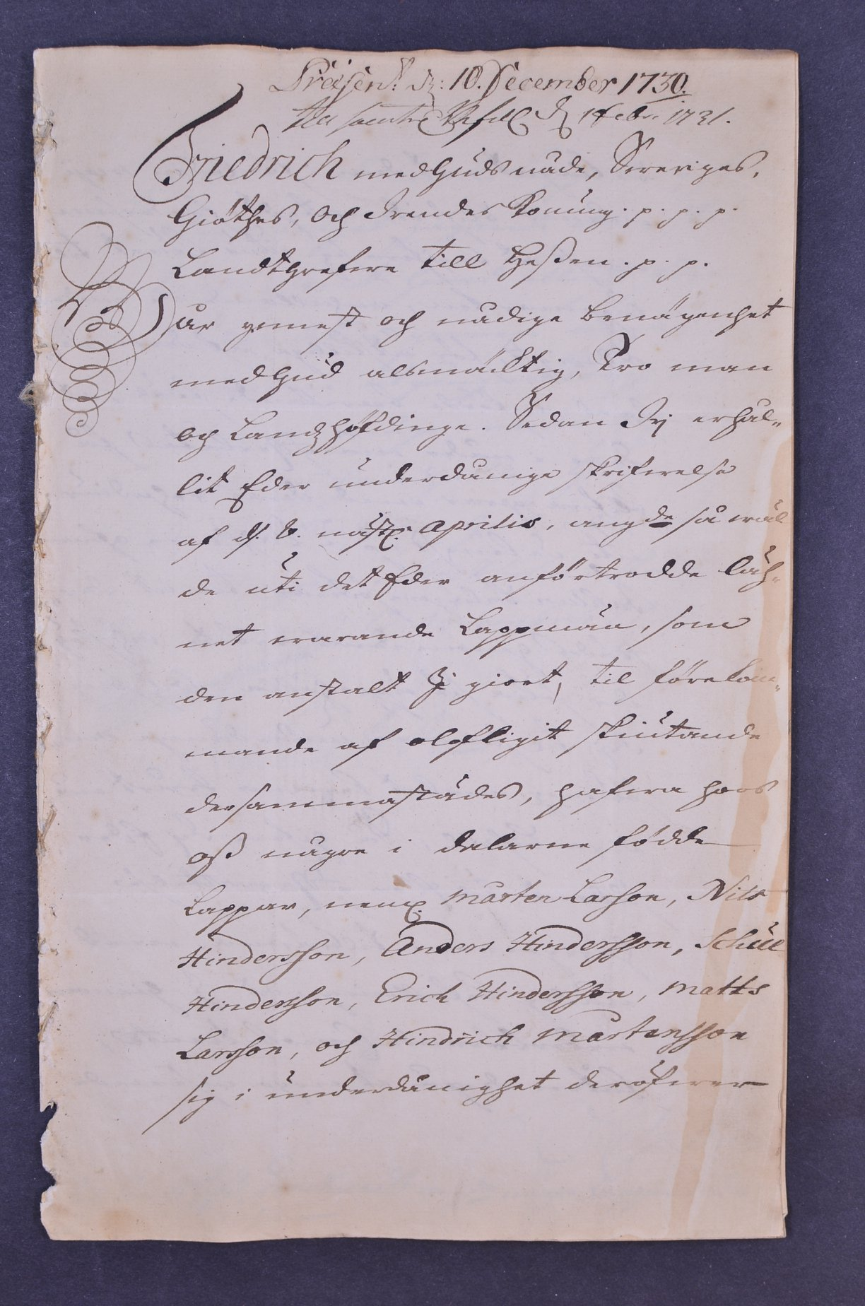 Länsstyrelsen i Kopparbergs län. Landskansliet vol. D I a:14 (Uppsala landsarkiv). 13 november 1730.